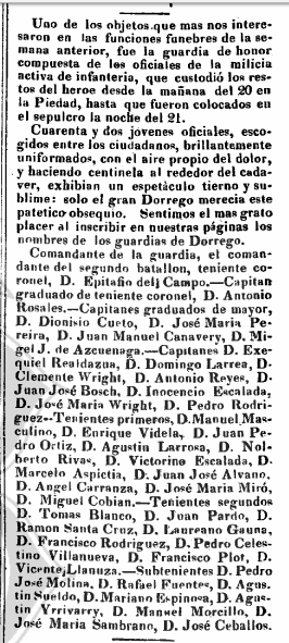 Honras fúnebres a Manuel Dorrego, publicadas en el díario El Lucero, el día martes 29 de diciembre de 1829.